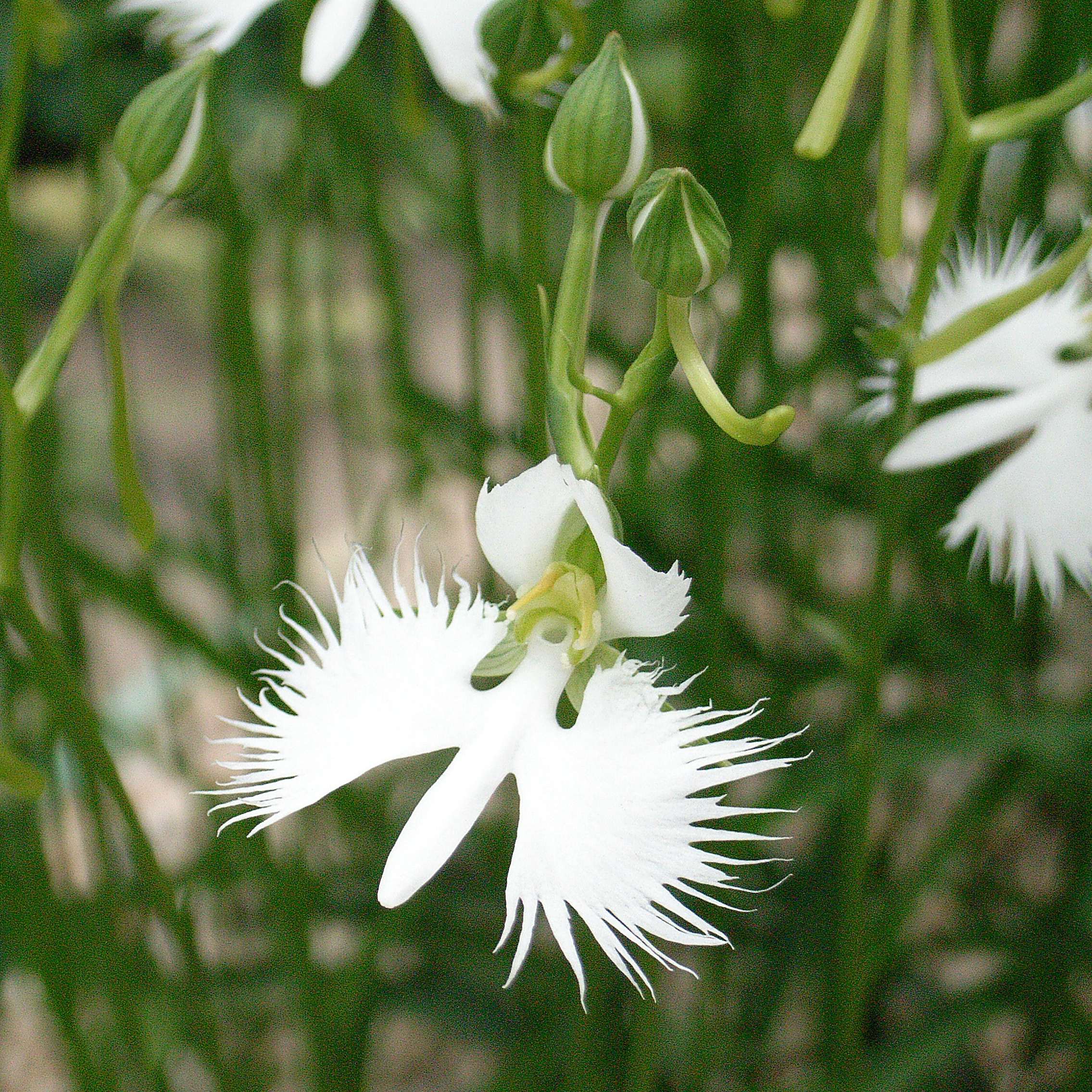 サギソウ fringed orchid Regnum: Plantae • Phylum: Magnoliophyta • Classis: Liliopsida • Ordo: Orchidales • Familia: Orchidaceae • Genus: Habenaria Wikispecies has an entry on: Habenaria radiata Species Habenaria radiata 植物界 被子植物門 単子葉植物綱 ラン目 ラン科 ミズトンボ属 Location: Himeji plant museum Other photos